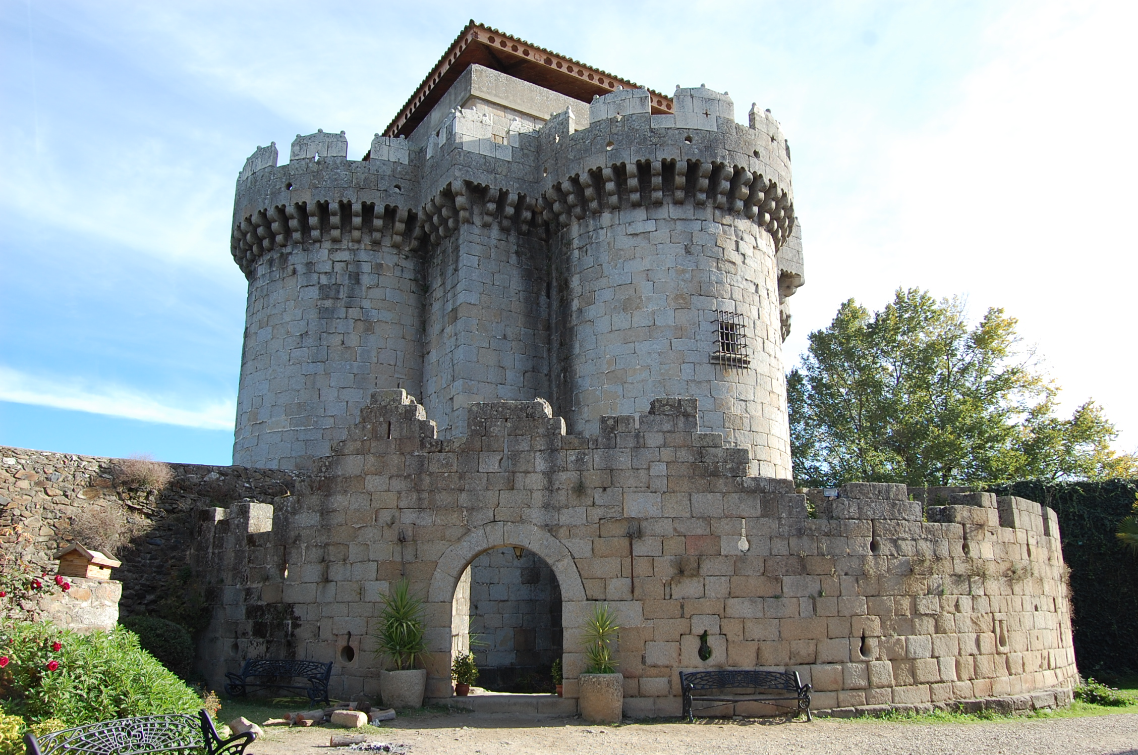 Puerta de entrada a la villa amurallada de Granadilla, tomada desde el interior.